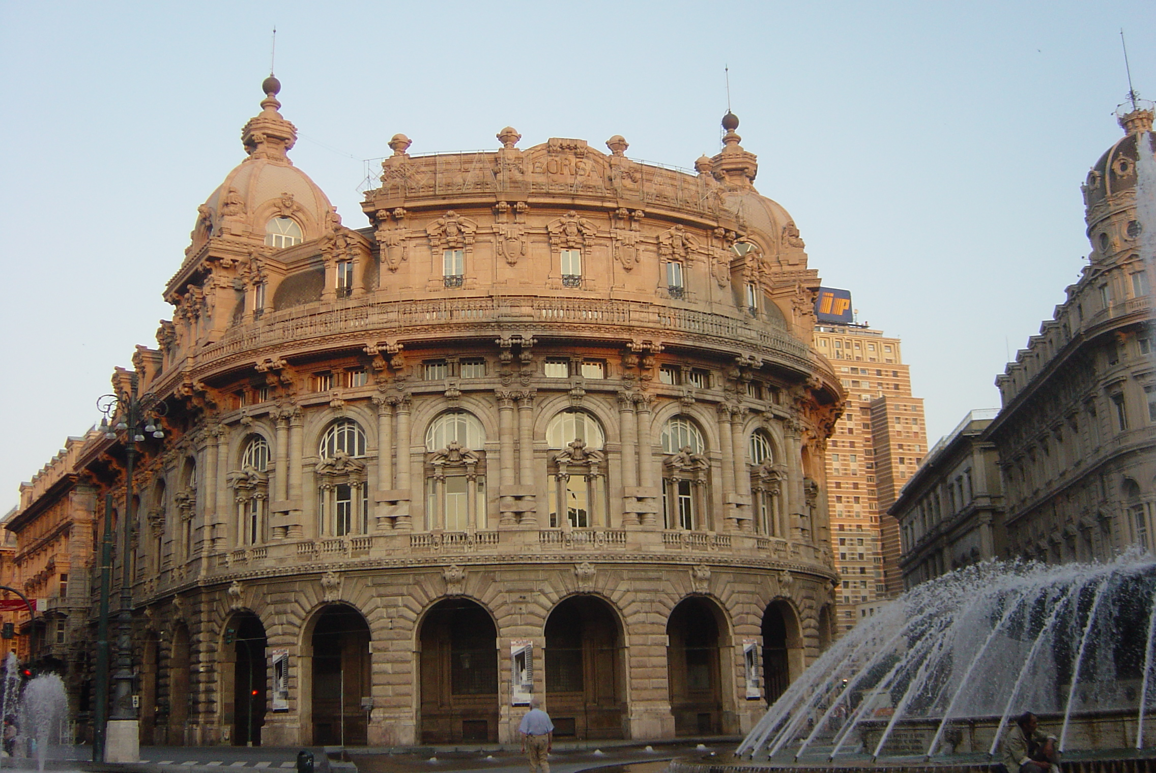 Genova: Il palazzo della Borsa in Piazza De Ferrari